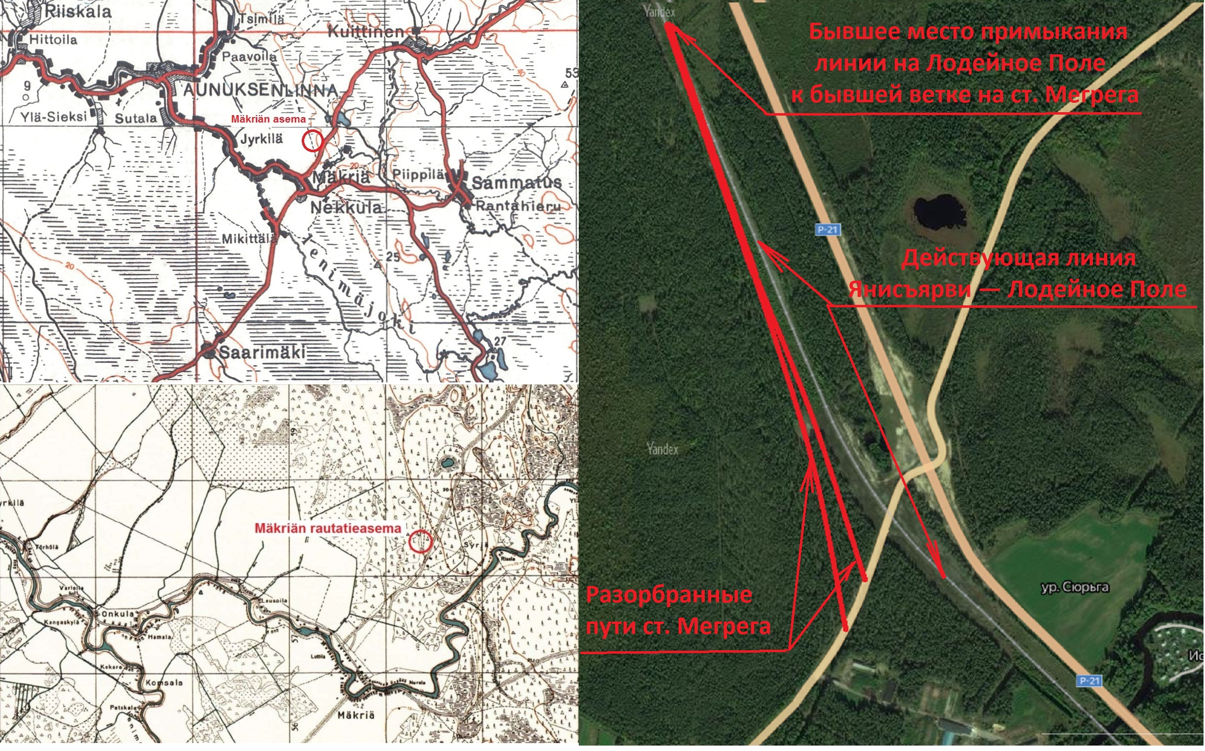 Мегрега.